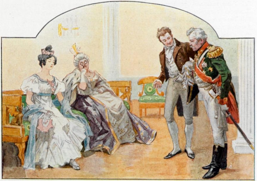 Пушкин А. Евгений Онегин. С иллюстрациями Е.Самокиш-Судковской. Издание первое. Пг., издание т-ва Р.Голике и А.Вильборг, 1908, 120 с., с илл. 26,2 x 23,2 см. Титульный лист работы А.Лео.